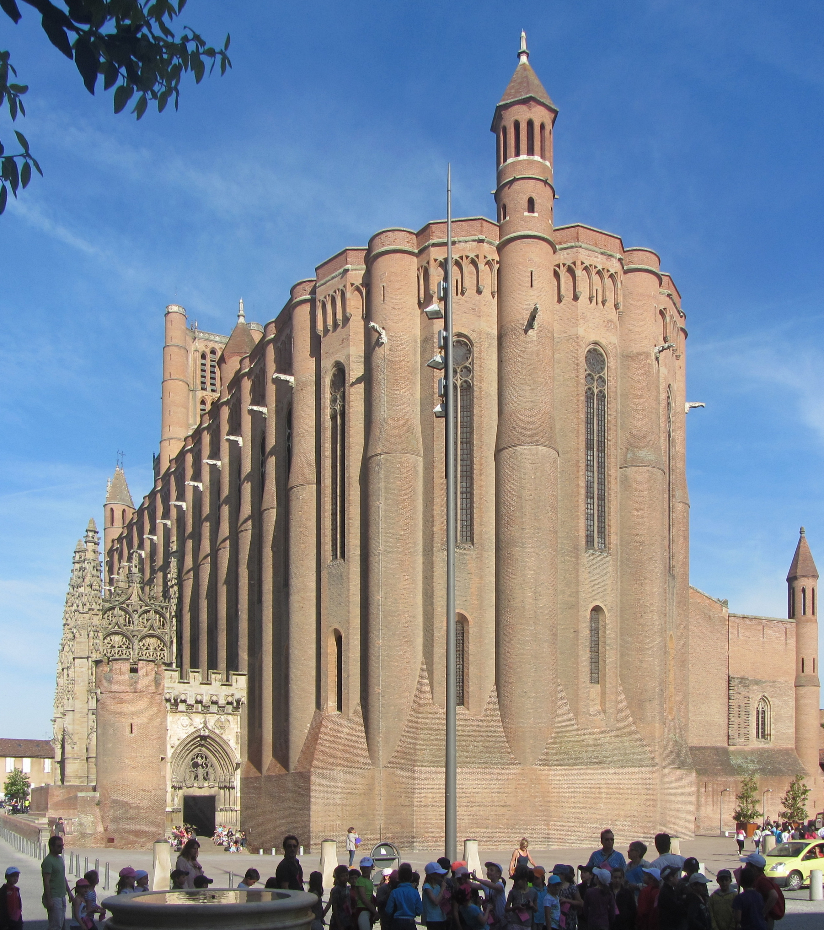 Sankt Cäcilia Kathedrale in Albi.